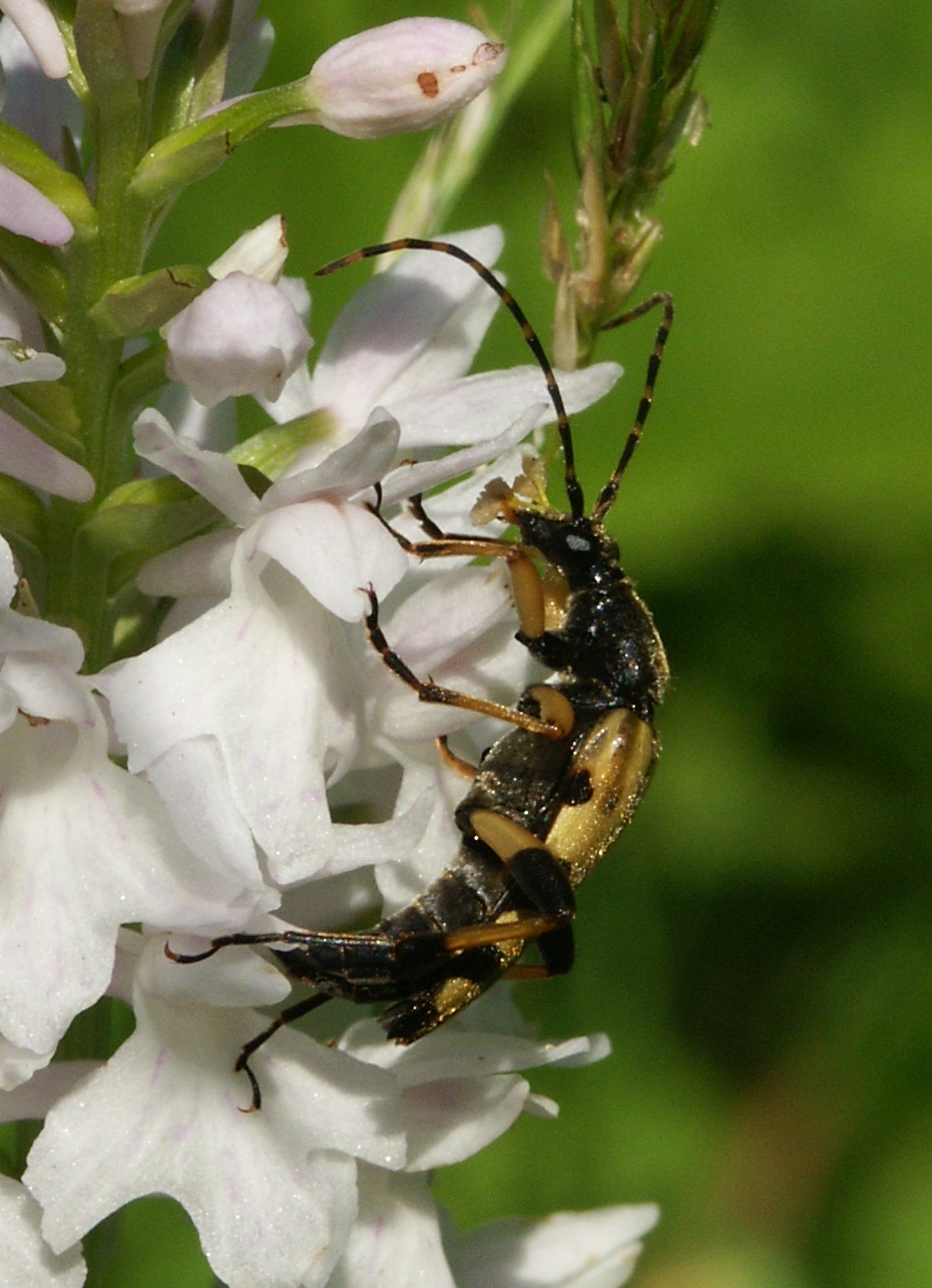 Rutpela maculata pollinating Dactylorhiza fuchsiiSchwäbisch-Fränkische Waldberge, Germany